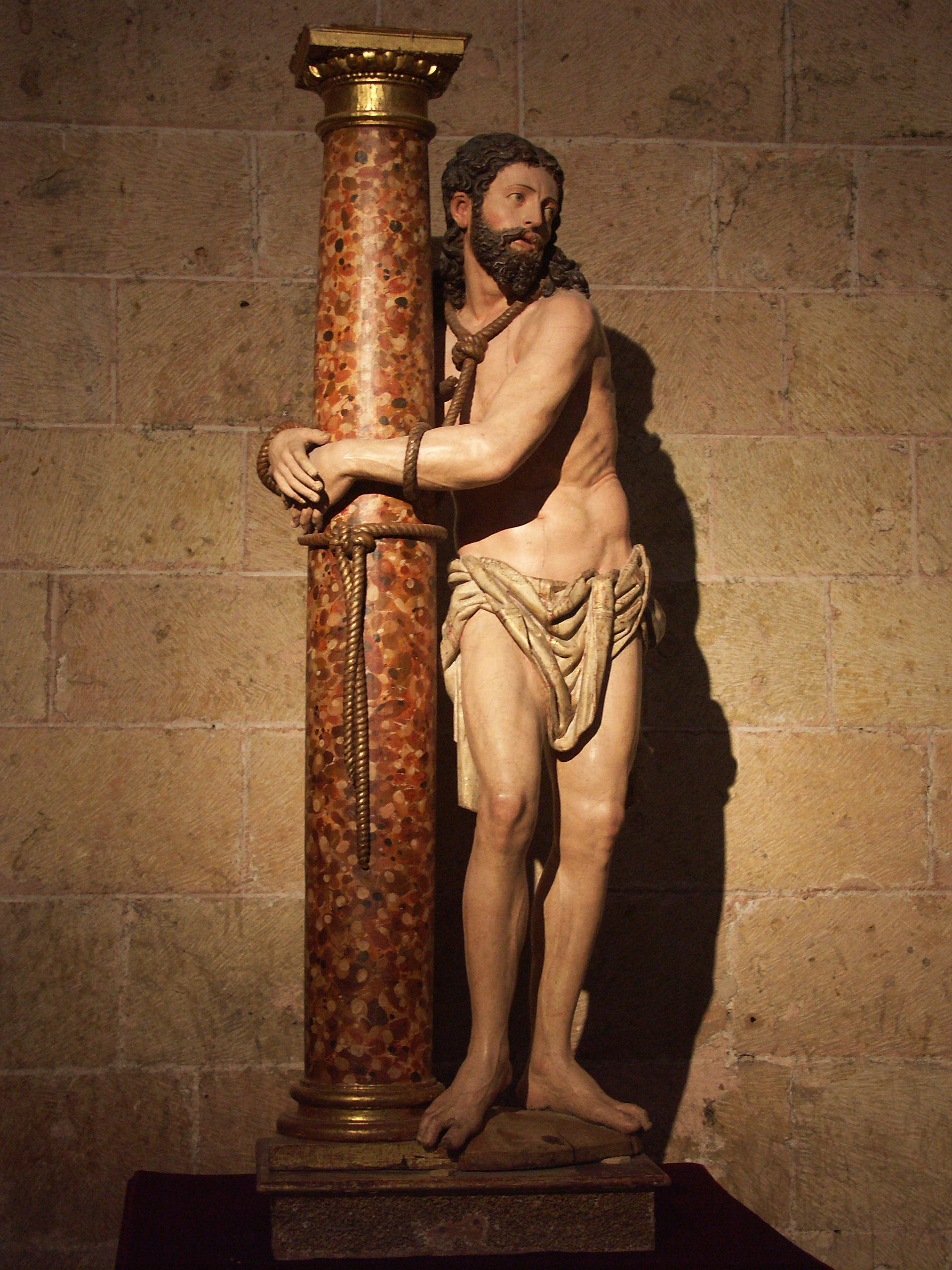 Imagen de Cristo a la columna perteneciente al retablo de San Pedro conjuntamente con la figura del santo arrepentido